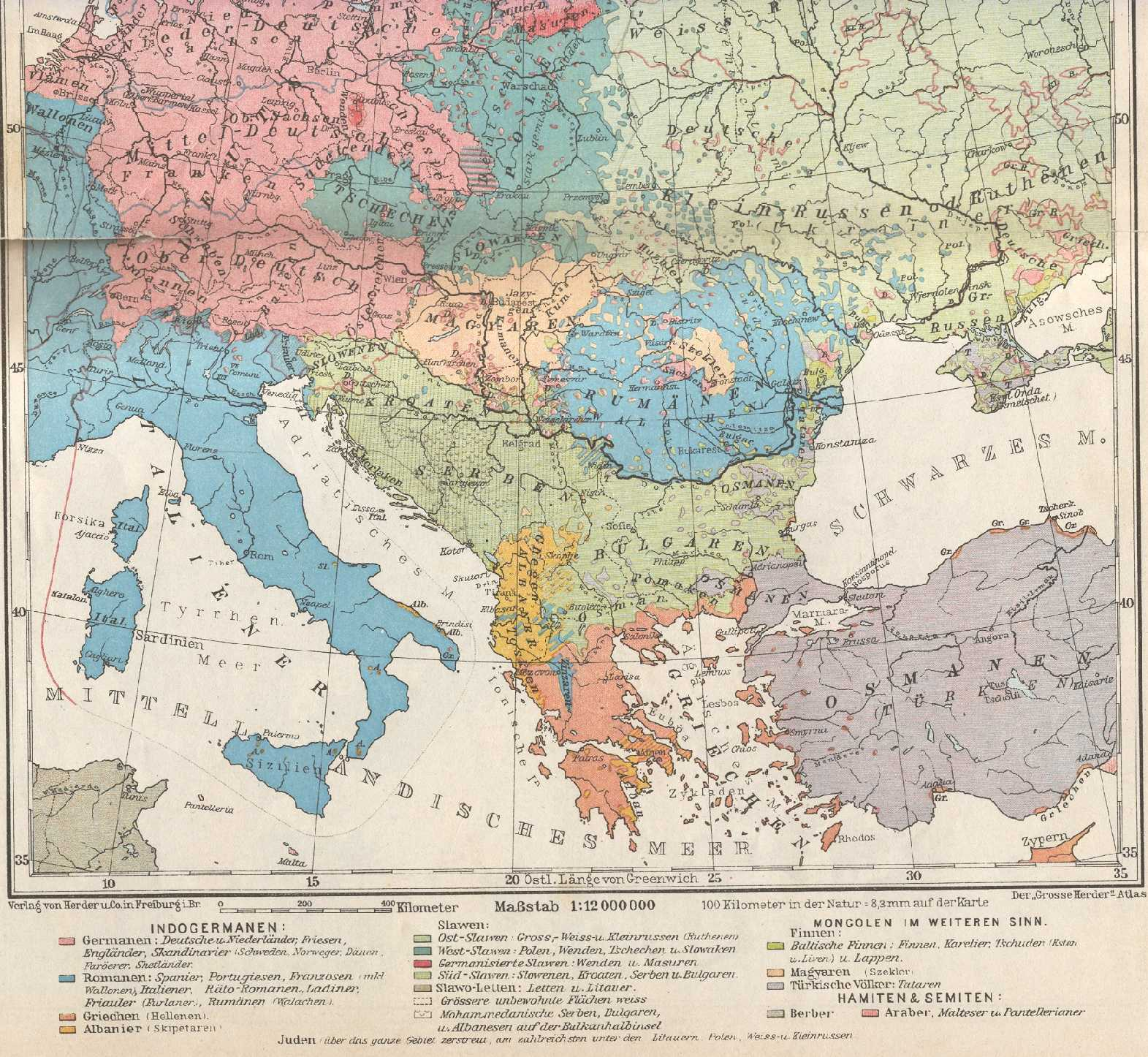 Ethnische Karte Mitteleuropas